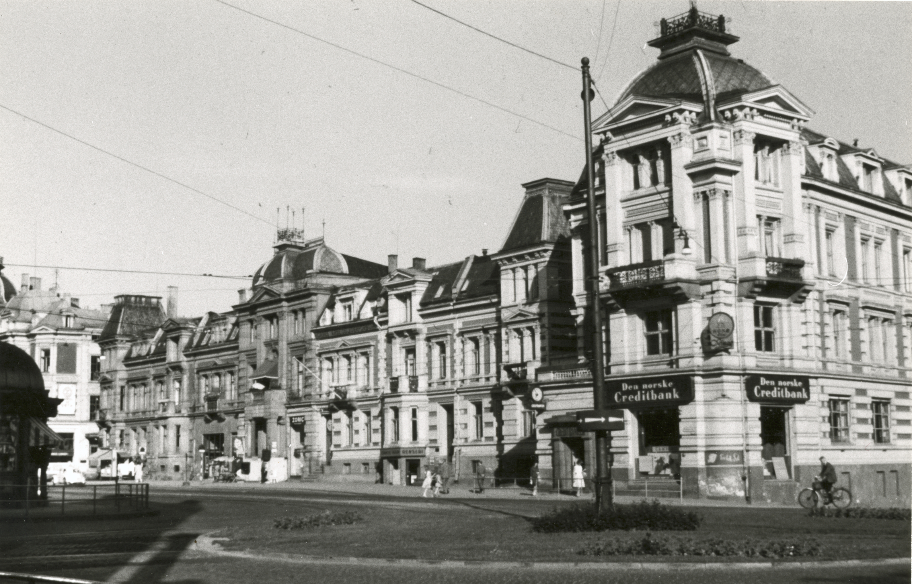 Det engelske kvarter i Oslo, Oslo This image on crowdsourcing geotagging platform Fotodugnad